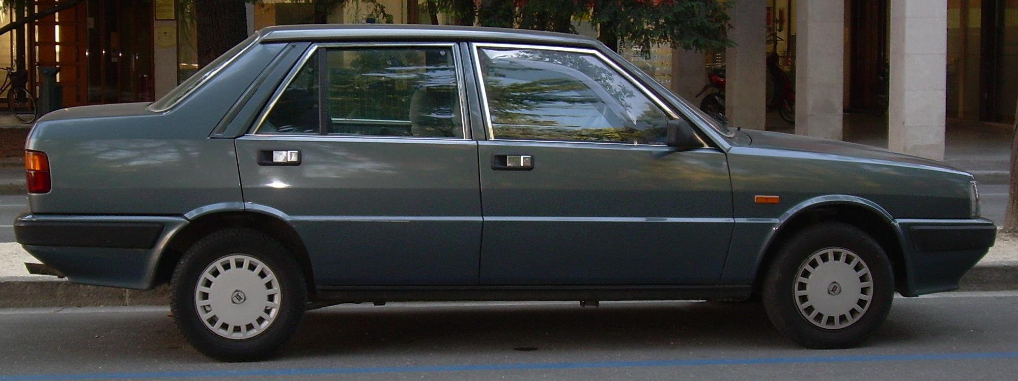 Autore:Powering Licenza: Una Prisma seconda serie